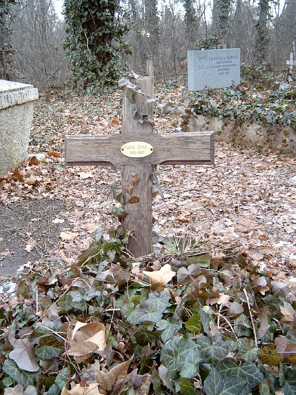 Rubik Ernő, id. sírja Budapesten. Kerepesi temető: 47-1-126.